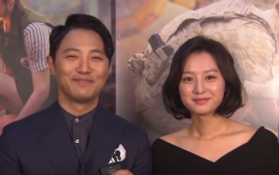 "태양의후예" 드라맥스 ID영상 - 진구&김지원